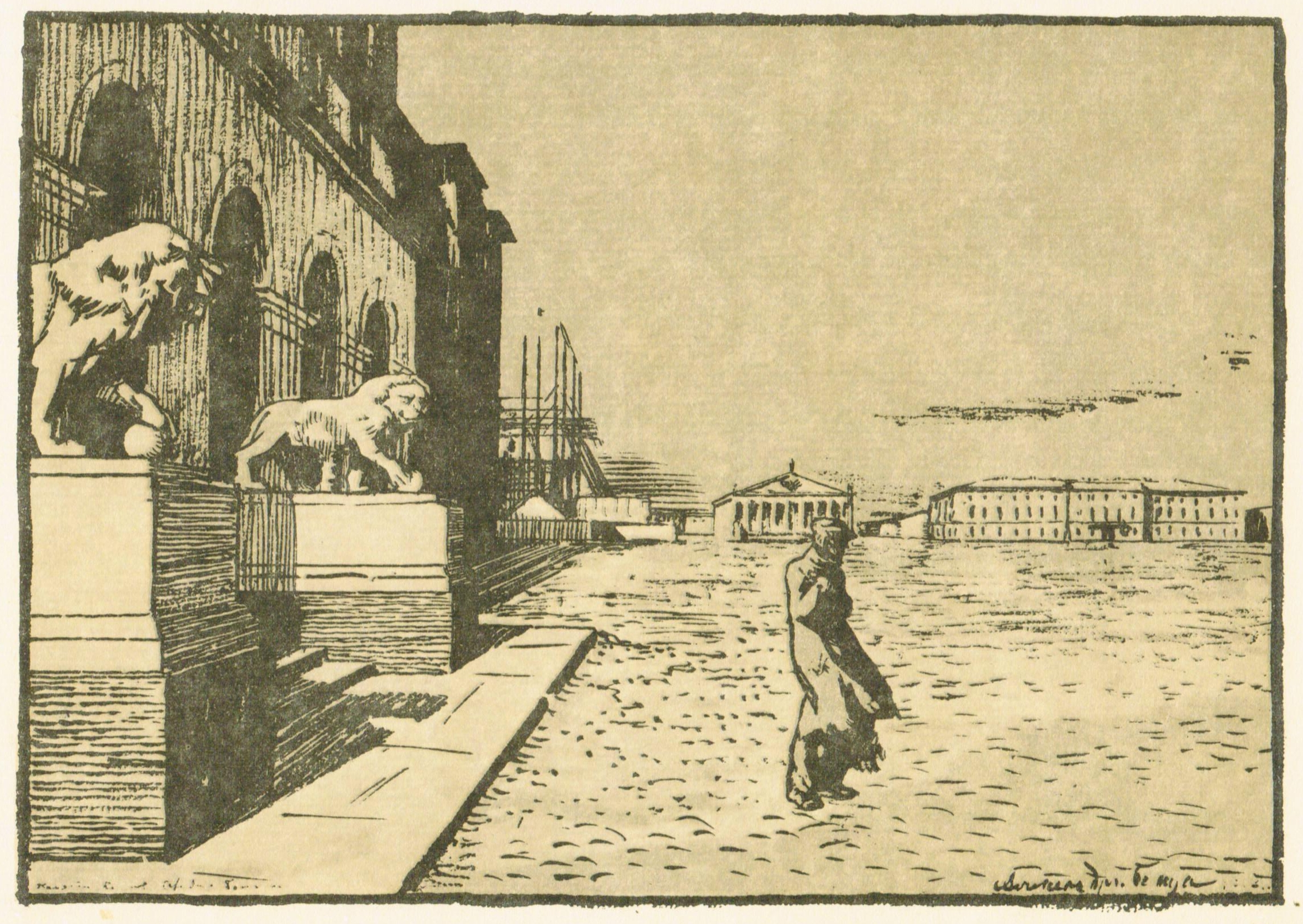 Иллюстрации Бенуа к «Медному всаднику» Пушкина 1899-1905 годы